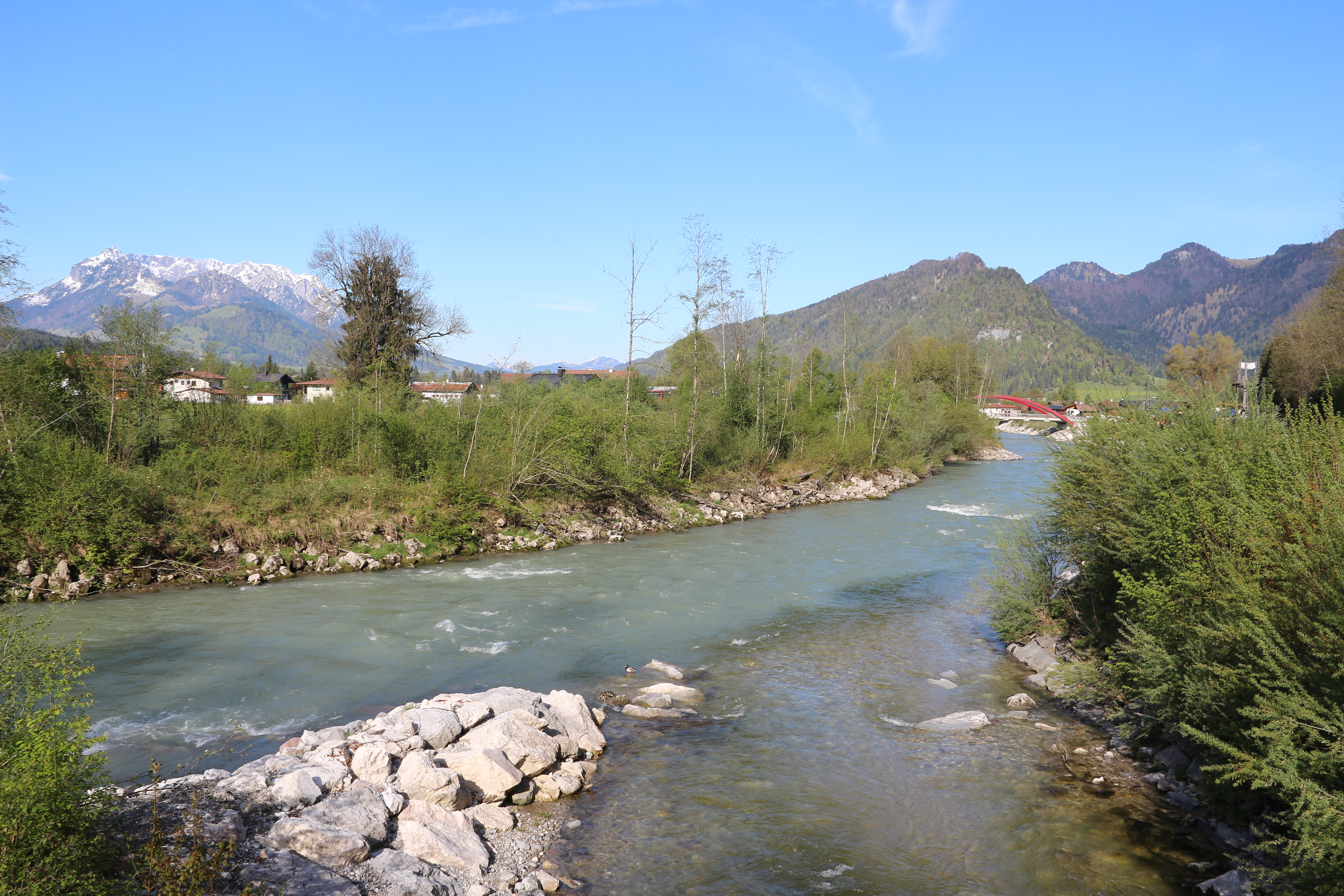 Mündung der Schwarzlofer in die Großache in Kössen, Tirol.